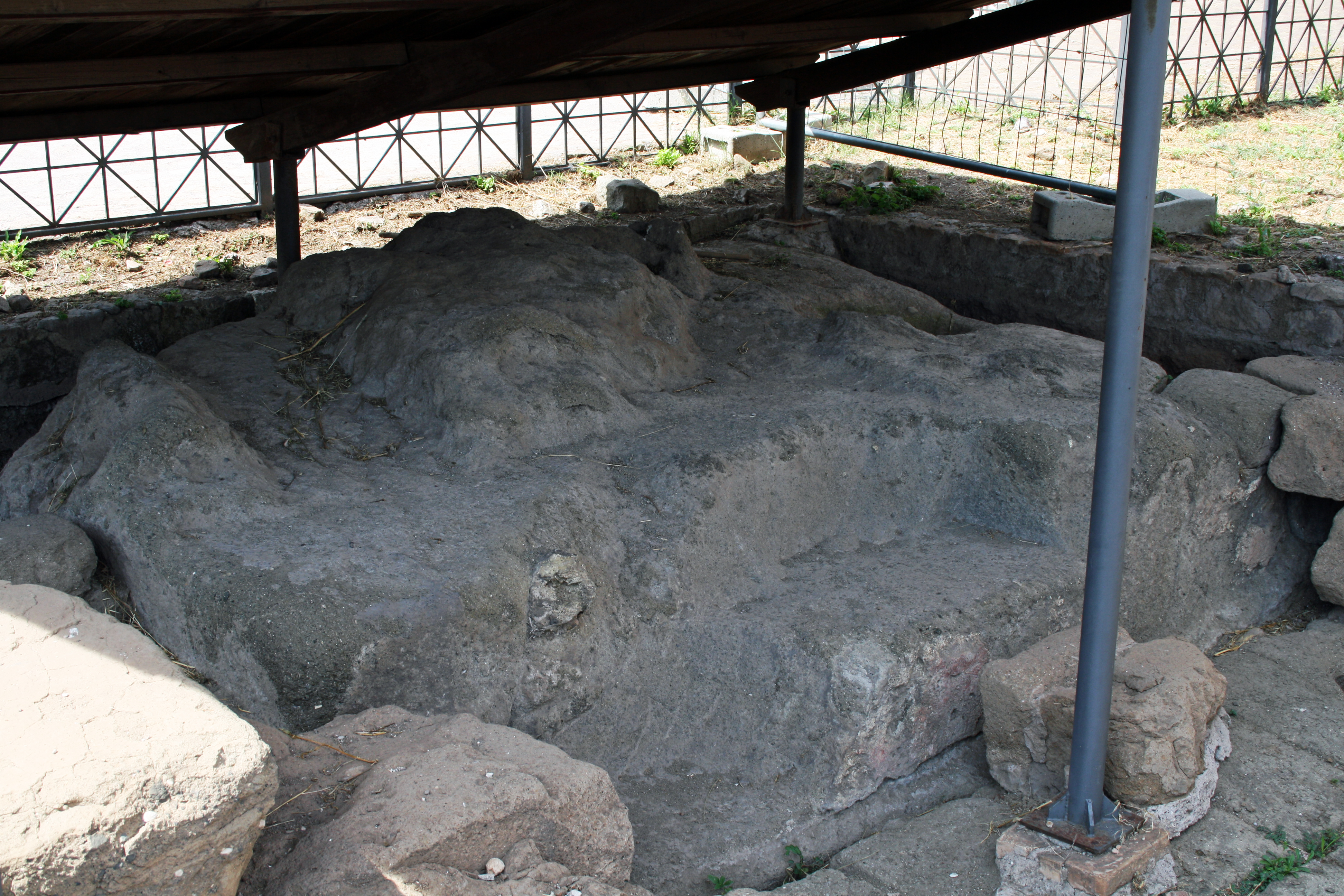 Volcanale